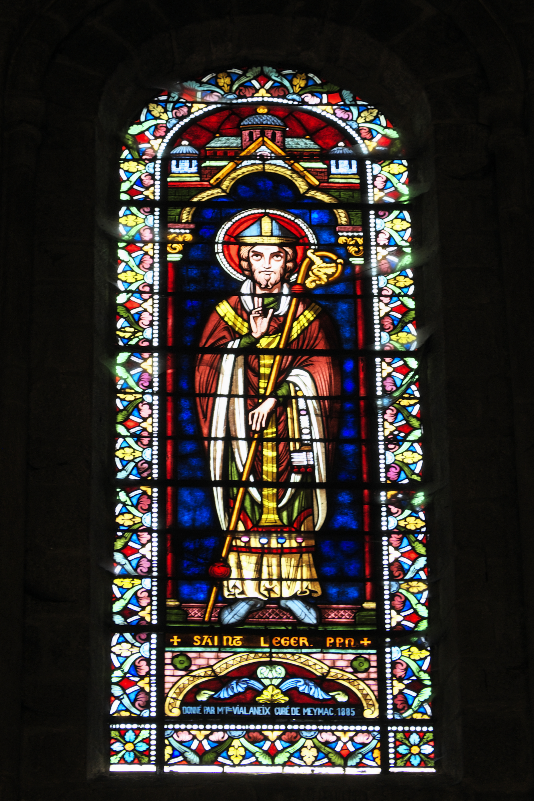 Ehemalige Benediktiner-Abteikirche Saint-André-Saint-Léger in Meymac im Département Corrèze (Nouvelle-Aquitaine/Frankreich), Bleiglasfenster mit der Jahreszahl 1885; Darstellung: Heiliger Leodegar